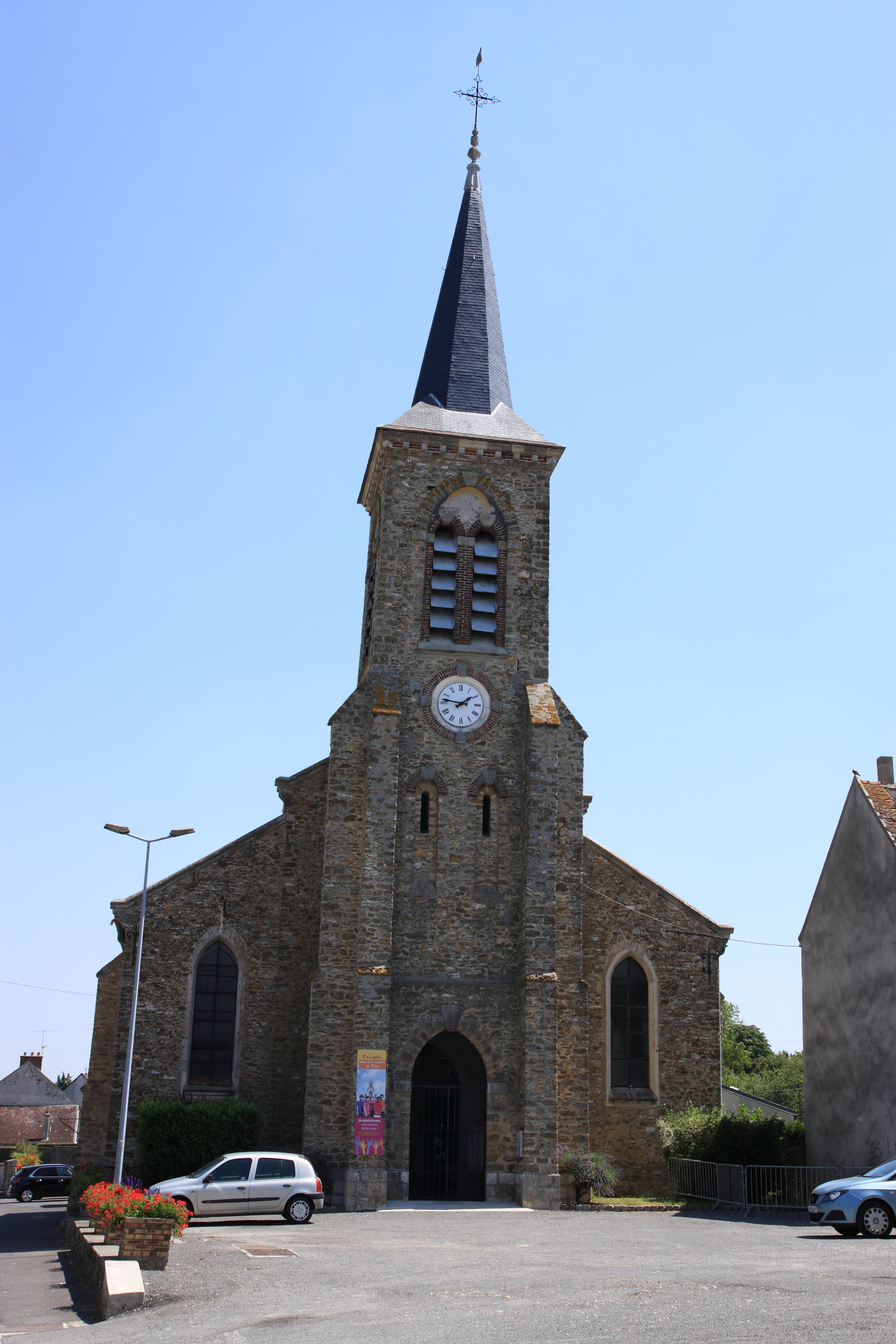 Église de Saint-Siméon (77)